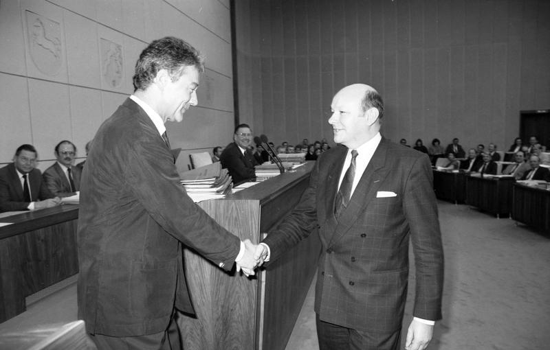 Bonn, 20. Oktober 1989 Letzte Bundesratssitzung unter der Präsidentschaft des Ministerpräsidenten von Schleswig-Holstein, Björn Engholm. Zu seinem Nachfolger als Bundesratspräsident wurde in dieser Sitzung der Regierende Bürgermeister von Berlin, Walter Momper, gewählt.